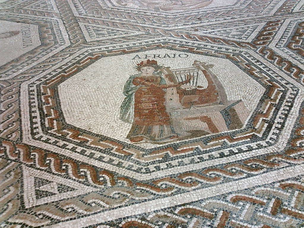 Erato, eine der neun Musen, auf dem Mosaik von Vichten, selbst fotografiert, April 2006, --Xocolatl 03:10, 22 April 2006 (UTC)